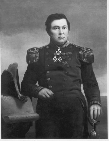 Herman Hendrik Timotheus Coops, schilderij (doek, olie, 70x90cm)